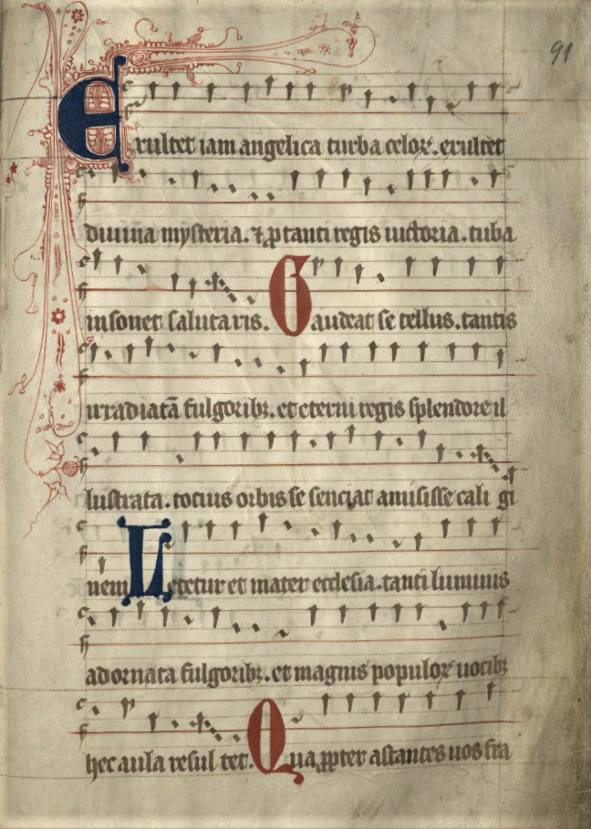 Anfang des "Exultet" im Epistolarium et evangeliarium "der Jakobikirche von 1386, heute Stadtbibliothek Lübeck, Ms. theol. lat. 2° 5 (Digitalisat)